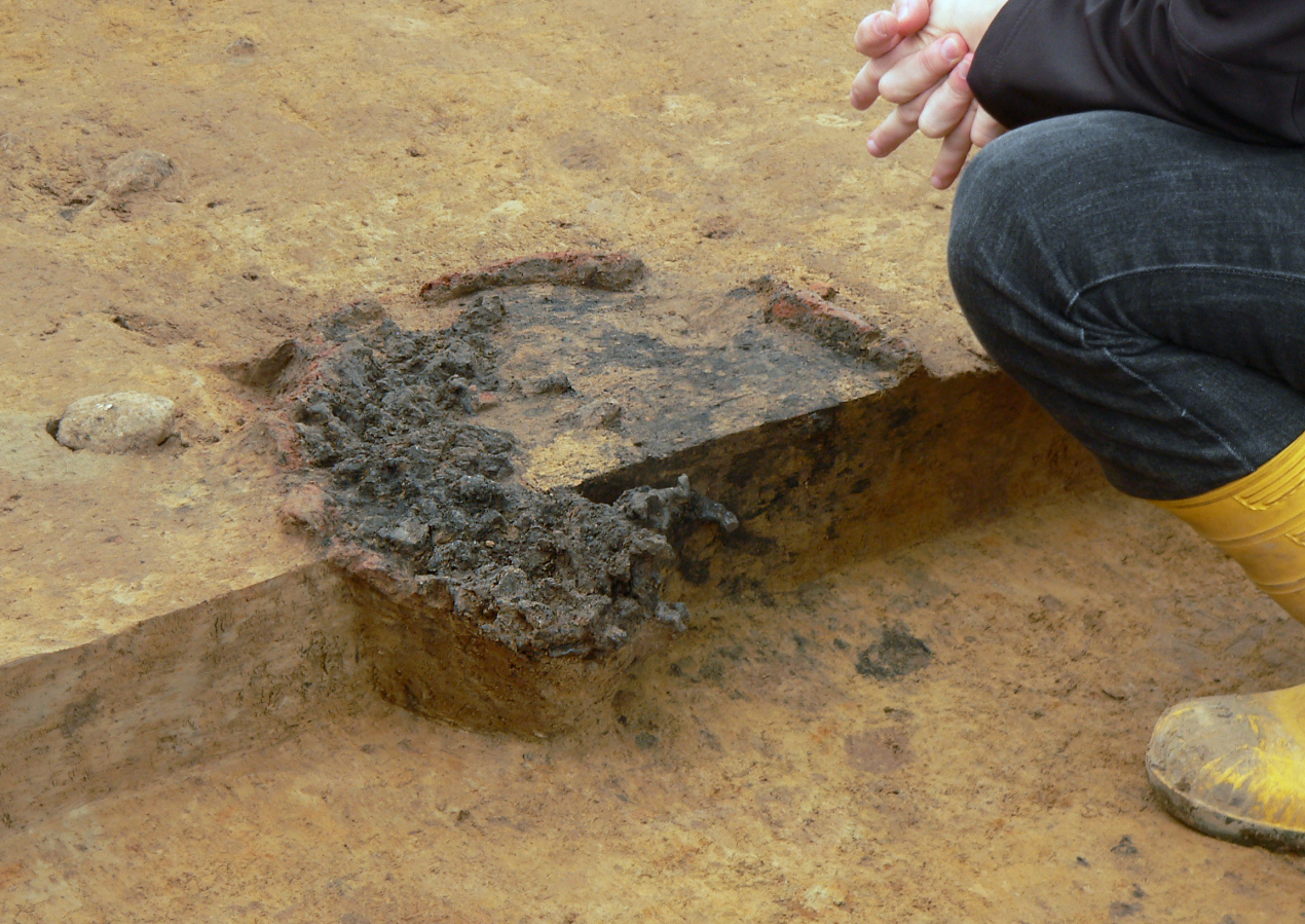 Ausgegrabenes Unterteil eines Rennofens in Sehnde, Ausgrabungsgelände im Baugebiet Kleines Öhr